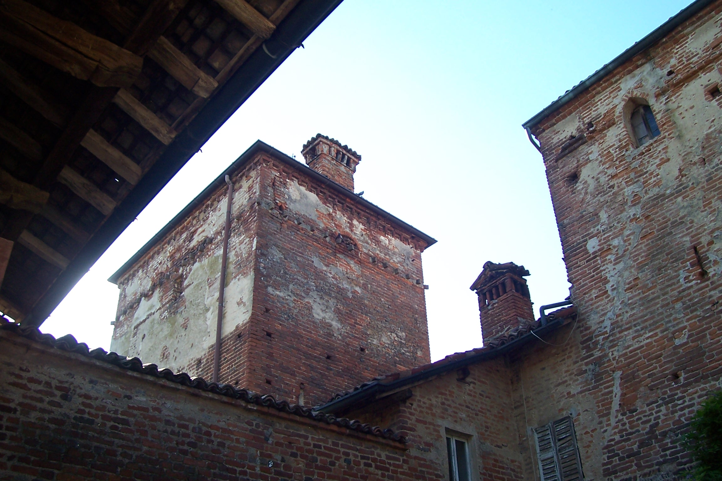 Lardirago, (Pavia) uno scorcio del castello